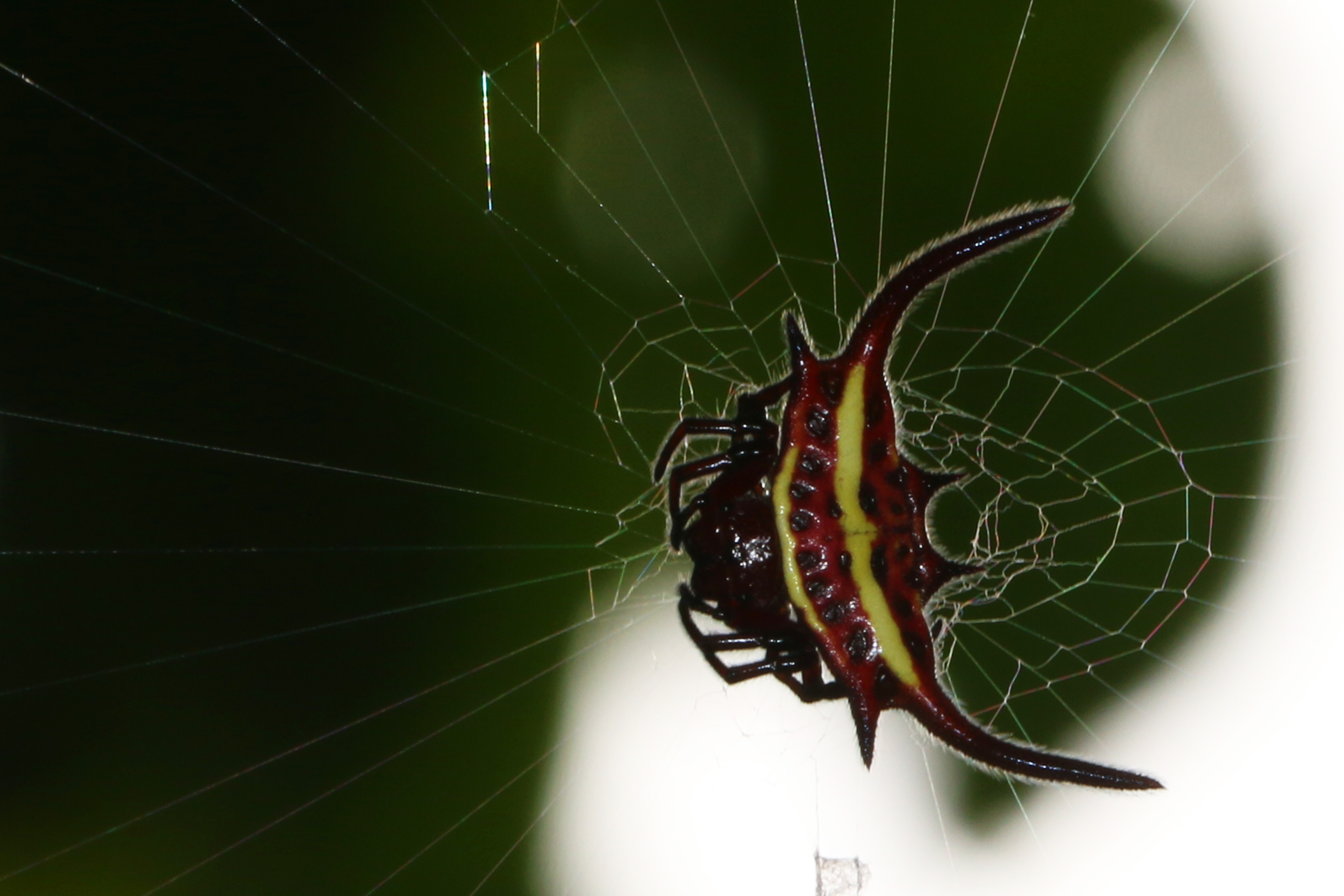 Gasteracantha falcicornus, Gorongosa National Park, Mozambique